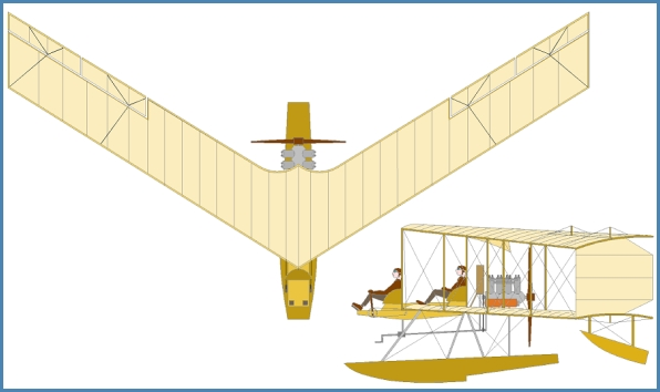 Burgess-Dunne Model BD-1B - AH-7